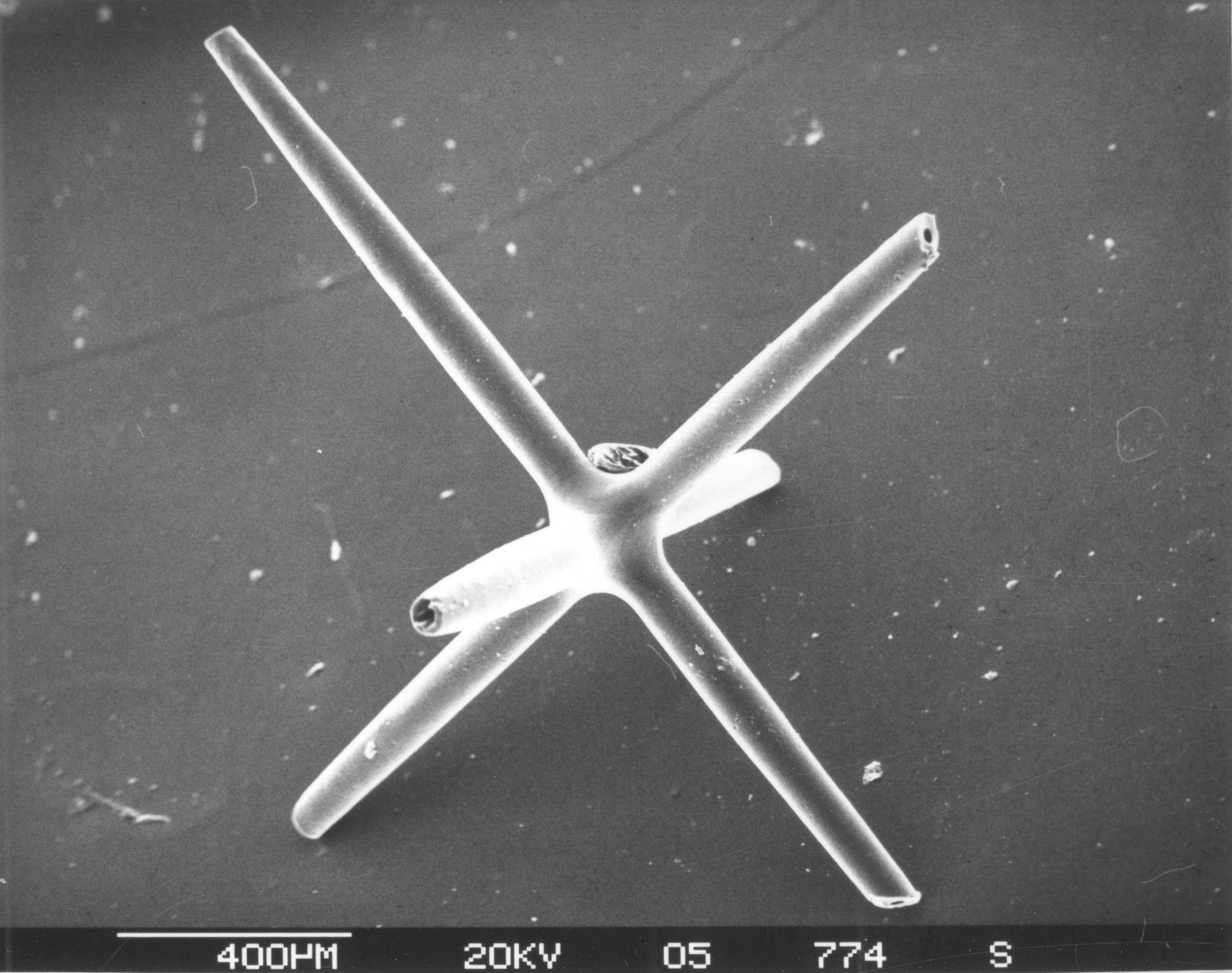 Sponge spicule